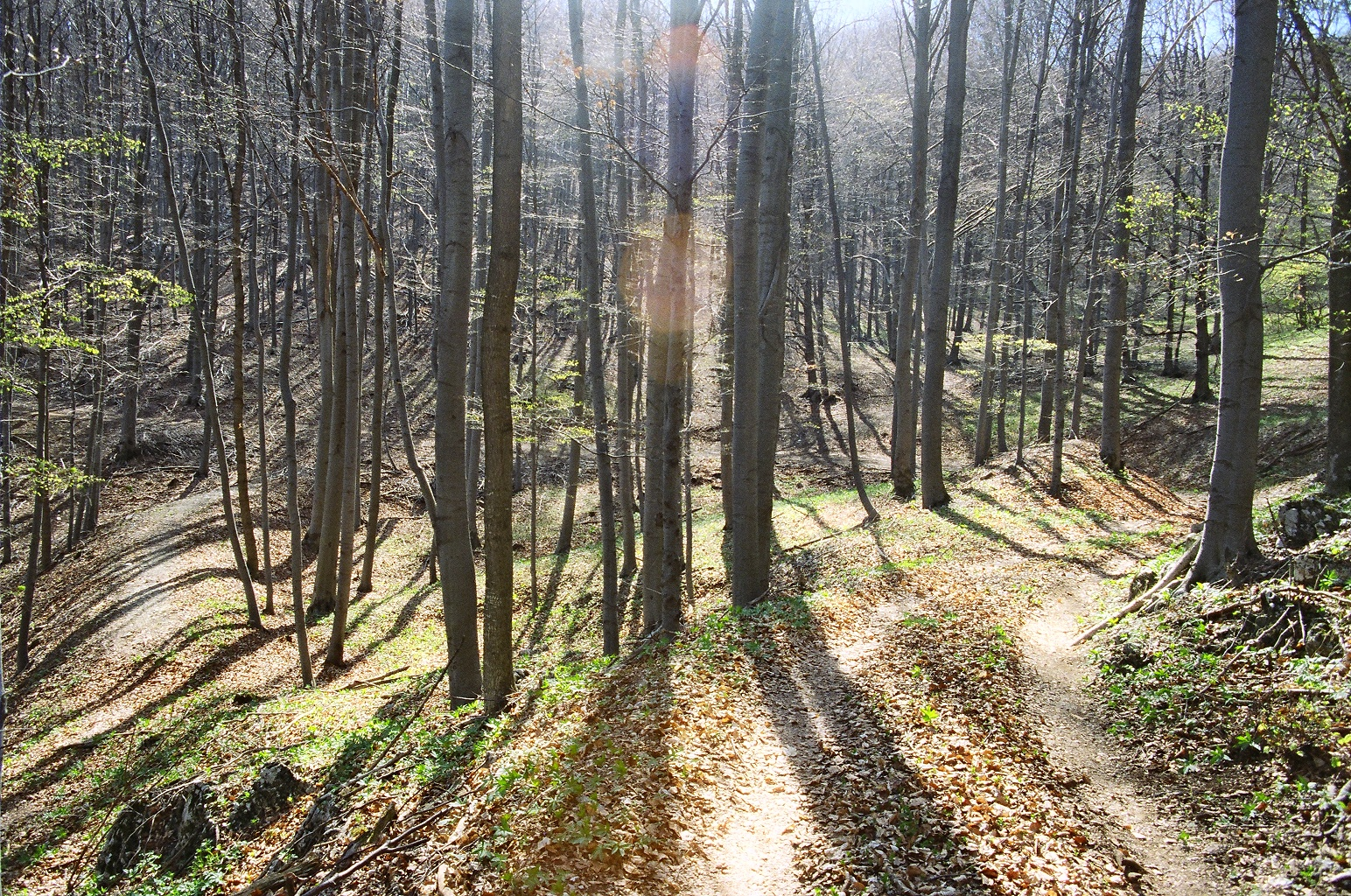 Erste Haarnadelkurve in der Trasse der Szilvasvarad Waldbahn am Vörös-kö-berc